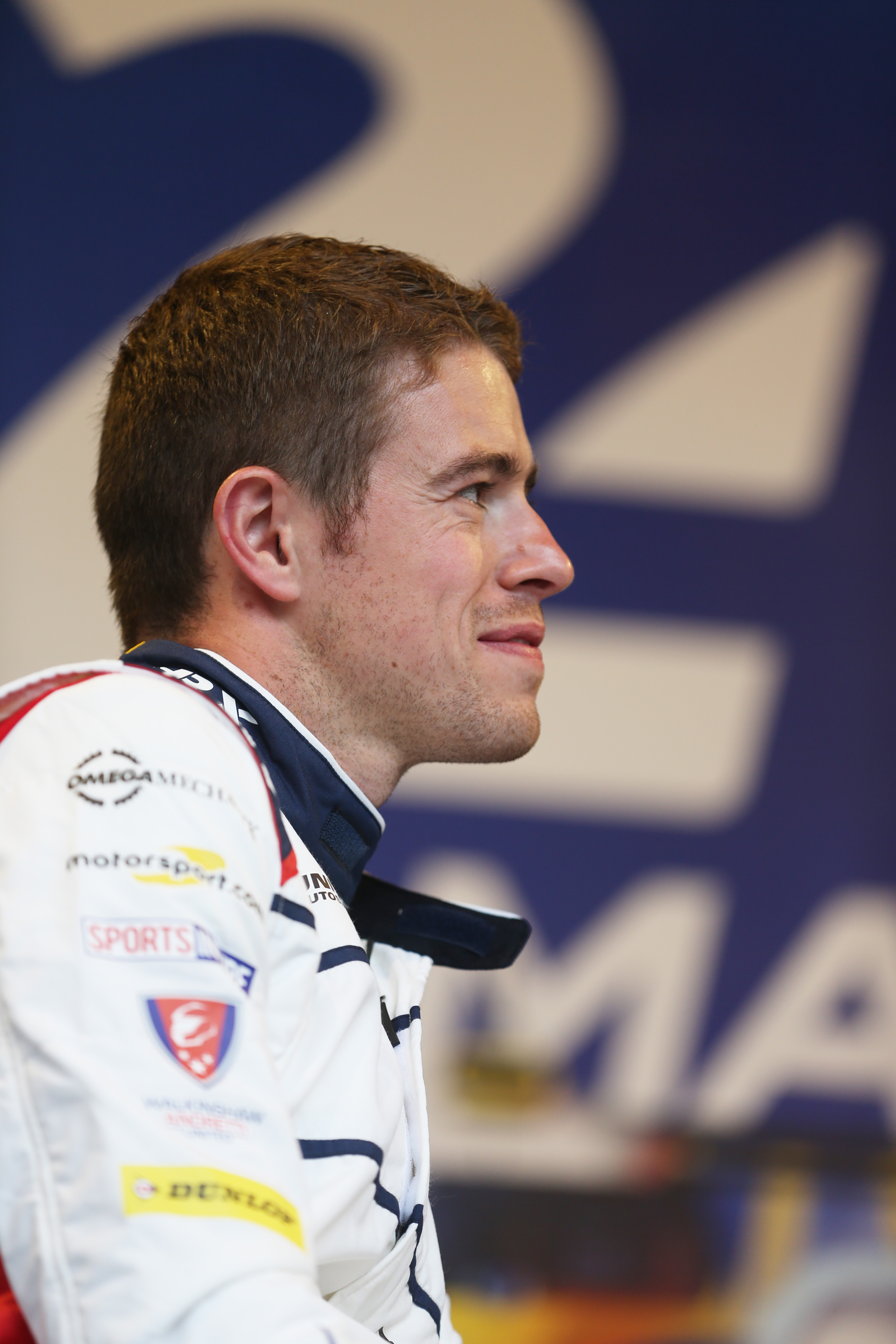 United Autosport lors des 24 Heures du Mans 2018.